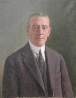 Luis Cousiño Talavera (Santiago de Chile, 5 de mayo de 1874 - 25 de mayo de 1948); fue un abogado, notario y director del museo nacional de bellas artes, chileno.